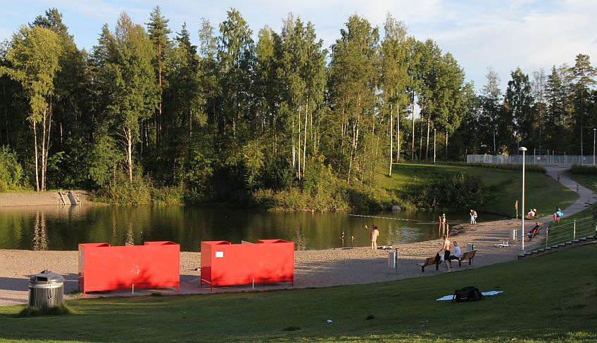 Vantaanlaakson ja Silvolan välillä sijaitsevaa Vetokannaksen virkistysaluetta, osoitteessa Vantaanlaaksontie 1, Vantaa. Alue sisältää Vetokannaksen vanhaan 1950- ja 1960-luvulla syntyneeseen sorakuoppaan vuosina 2010-2012 rakennetun uimarannan sekä leikki- ja kuntoilupaikan. Kesällä 2013 virkistysalueen rakennustyöt olivat vielä hieman kesken. Huom: Muista säilyttää viittaus kuvaajaan, mikäli käytät kuvaa.